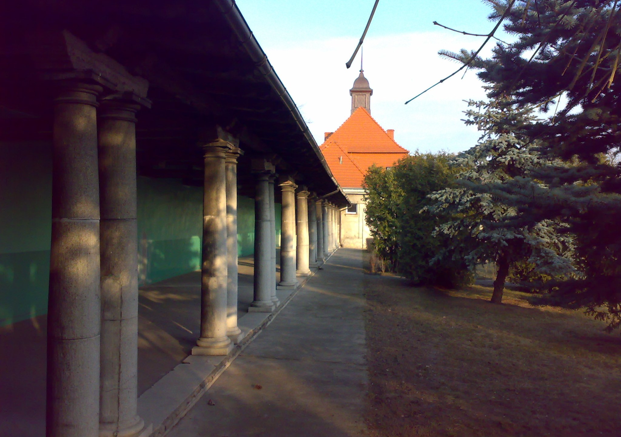 Dzieciniec pod Słońcem, Poznań, Droga Dębińska.